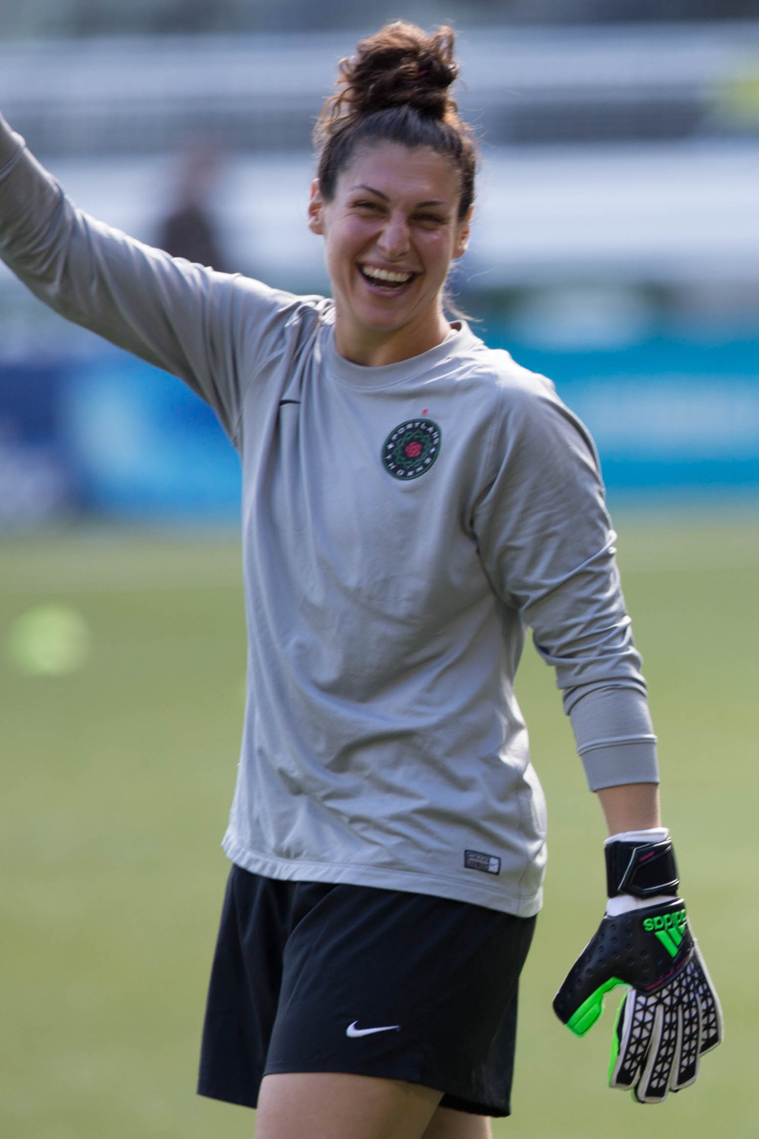 N42A2647.jpg